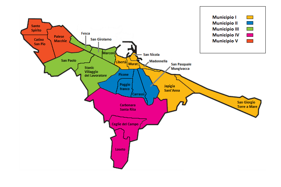 Municipi di Bari suddivisi in quartieri